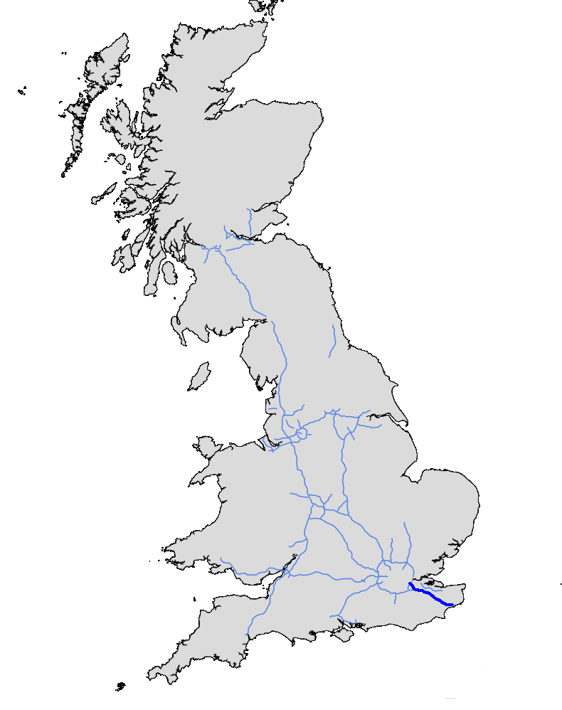 M20